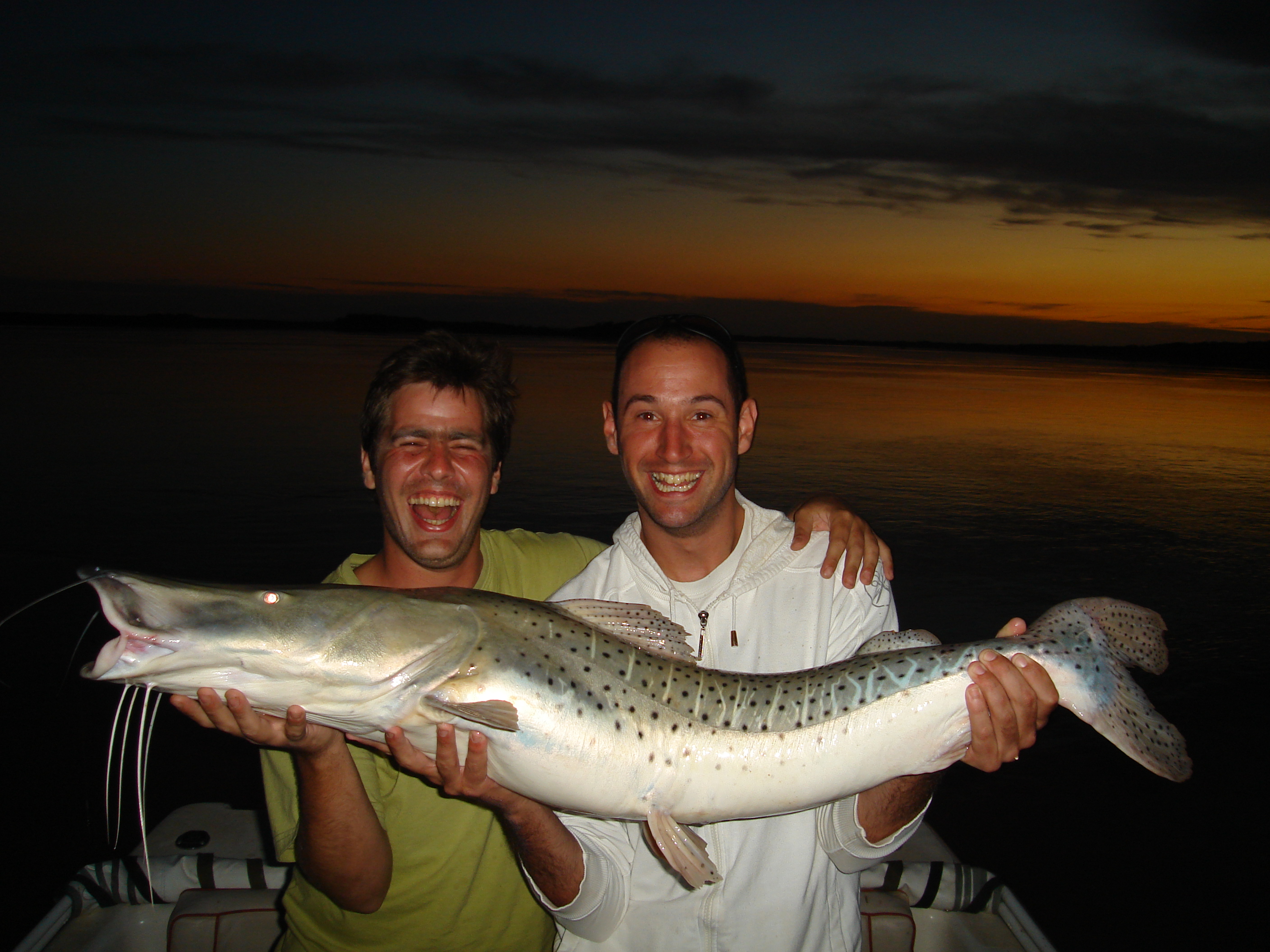 11,5 Kg